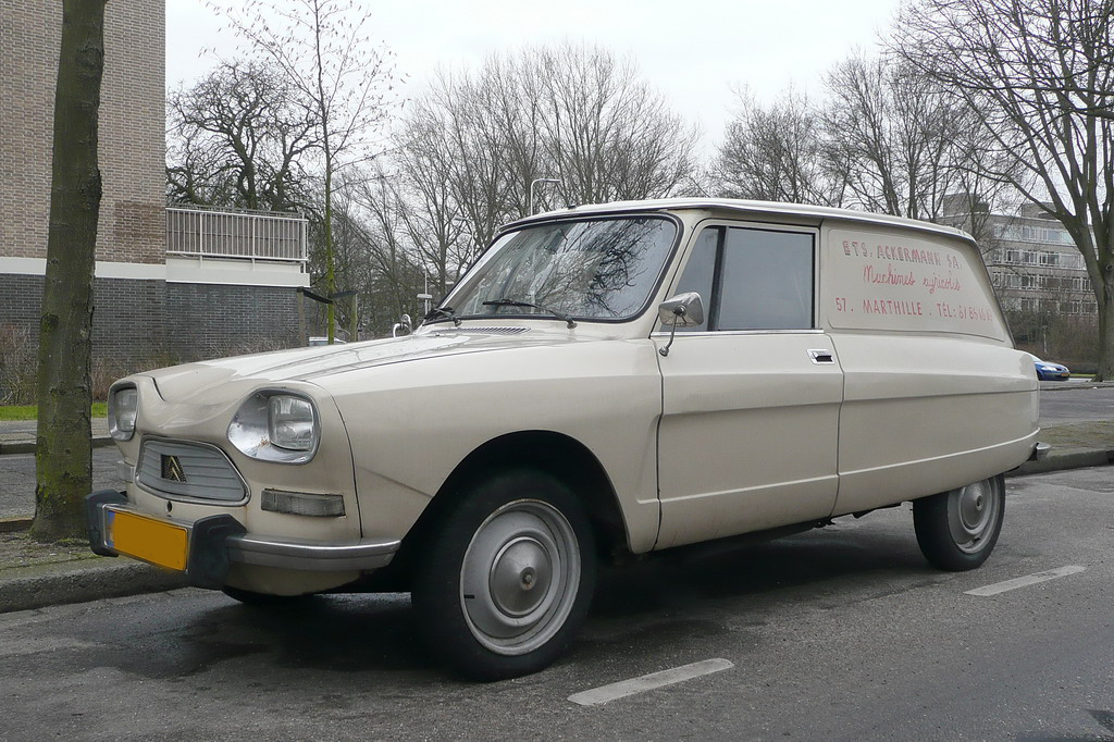 Bezuidenhoutseweg